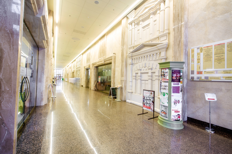 1 этаж (Галерея) центра «Менора» со стороны входа с пл. Успенской